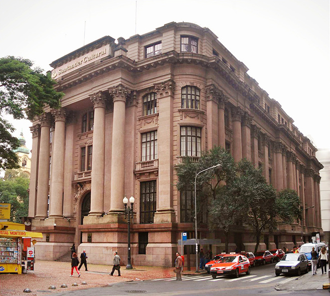 Santander Cultural, Porto Alegre, Rio Grande do Sul, Brasil